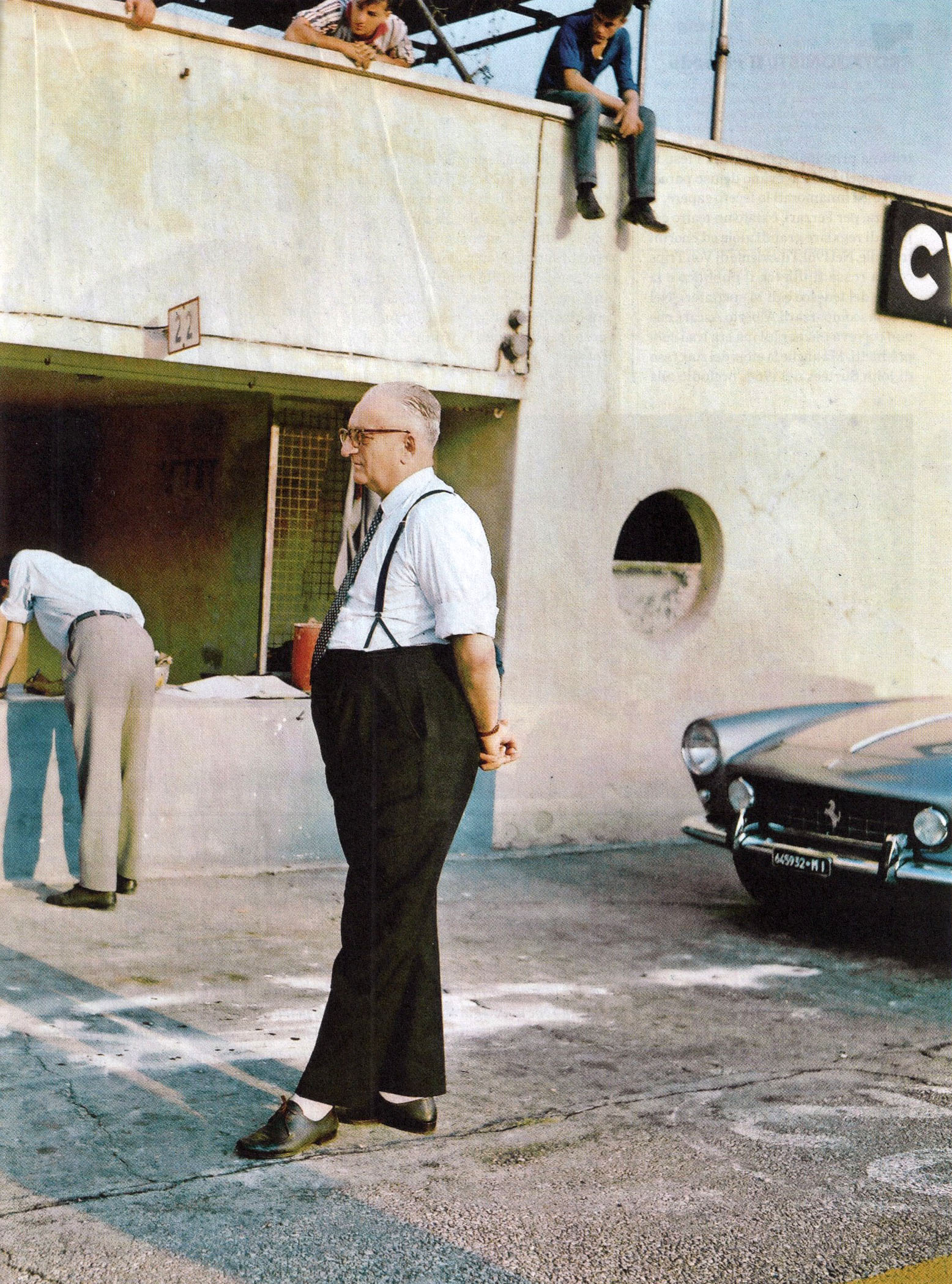 Monza, Autodromo Nazionale, 1962. Enzo Ferrari, fondatore della Scuderia Ferrari, nei box del circuito durante i test della sua squadra in vista del XXXIII Gran Premio d'Italia.